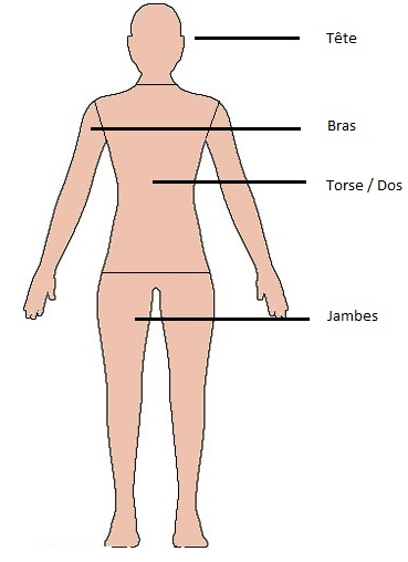 Schéma locs